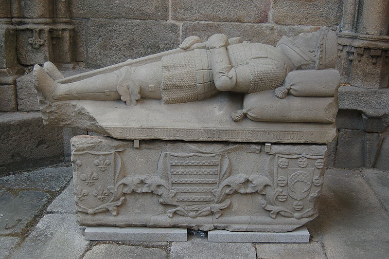 Sepulcro de Sueiro Gomes de Soutomaior, fotografado nas ruínas do convento de San Domingos de Pontevedra, e situado orixinalmente no arcosolio situado na parte oriental do muro sur do cruceiro. Hoxe está exposto no Museo de Pontevedra.